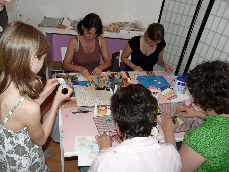 Foto von Scrapbook-Künstlern bei einem sogenannten Crop. Crops bezeichnen Treffen mehrerer Scrapper, bei denen Scrapbook-Arbeiten zu festgelegten Themen geschaffen werden.